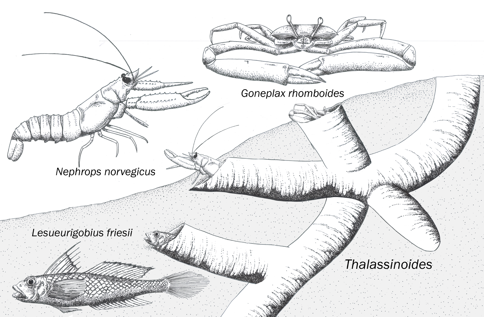 Imagen ilustrativa de cómo varias especies pueden realizar conjuntamente un mismo icnotaxón, en este caso dos crustáceos (Nephrops norvegicus y Goneplax rhomboides) y un pez (Lesueurigobius friesii) excavan galerías correspondientes a Thalassinoides. Este icnotaxón es común en el registro fósil aunque las especies que lo realizaron son diferentes a estas actuales.